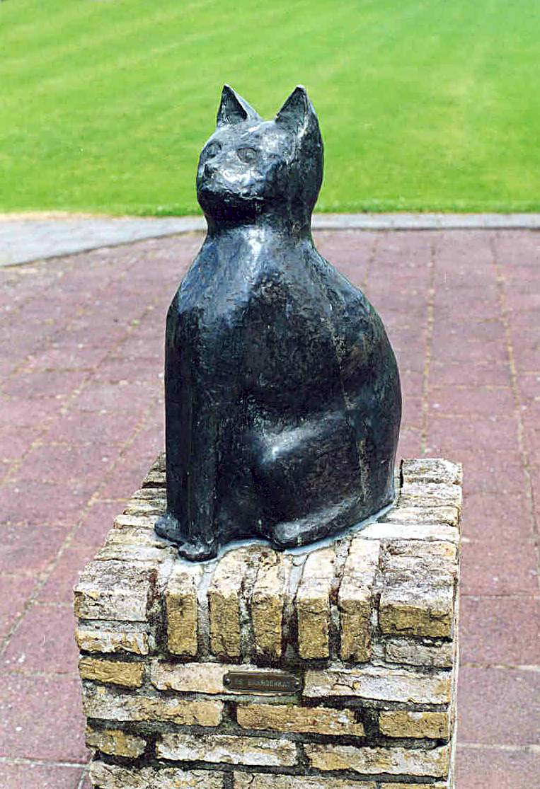 Atze Dijkstra, 1994